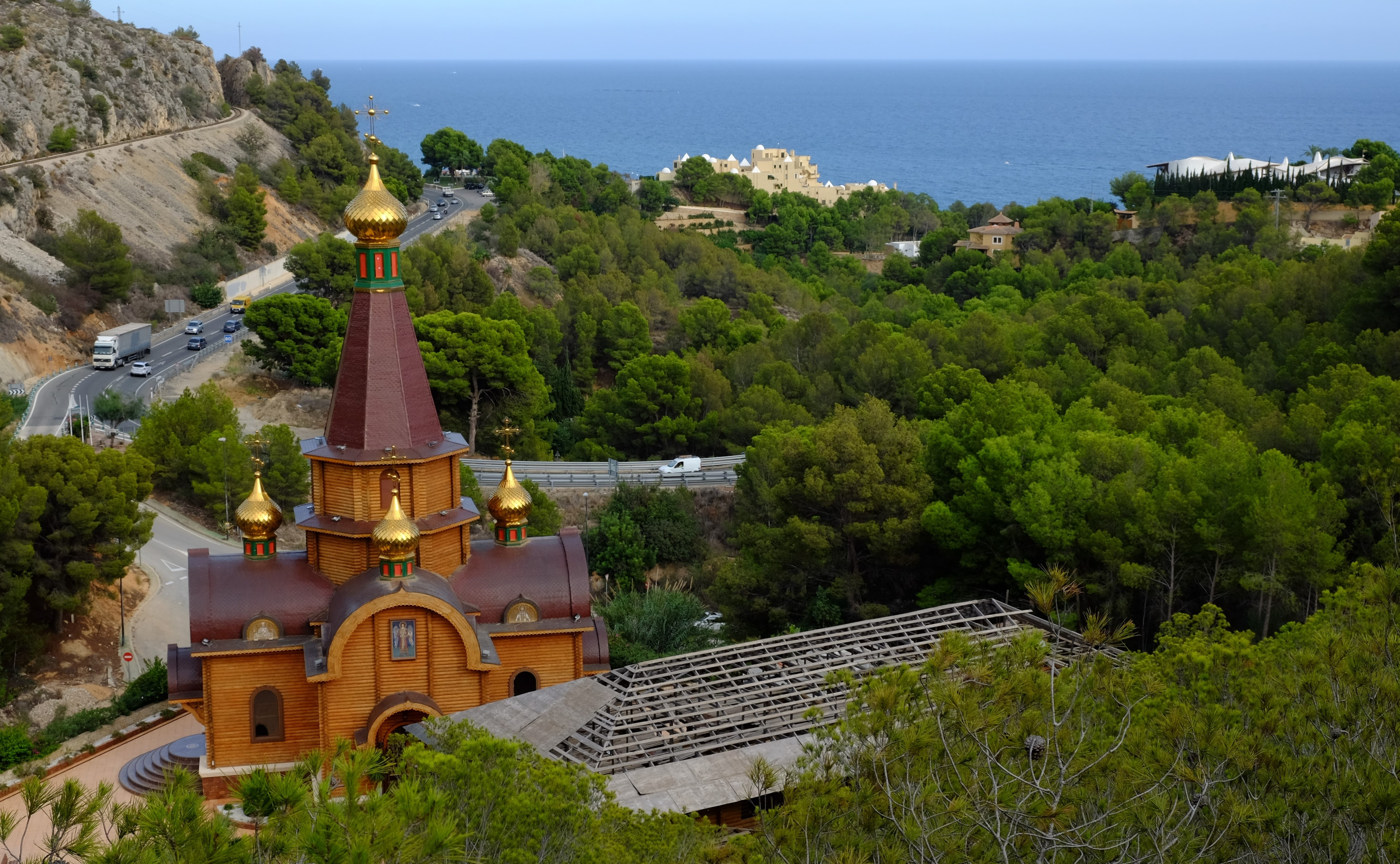 Iglesia Ortodoxa Rusa San Miguel Arcángel.